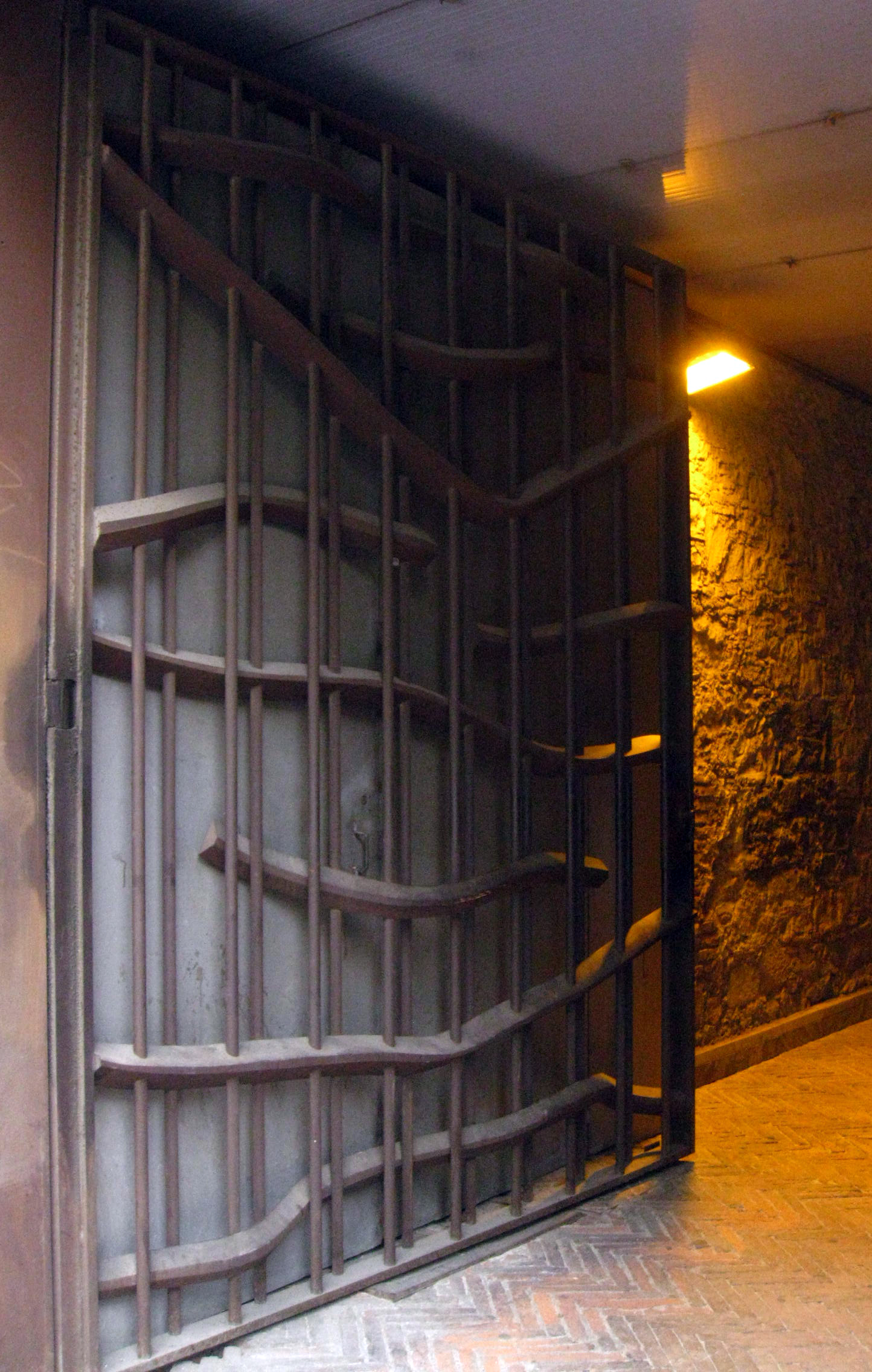 Porta del Jardí de la Torre de les Aigües (Robert Llimós). Jardí de la Torre de les Aigües (accés per Roger de Llúria, 58) (Barcelona)